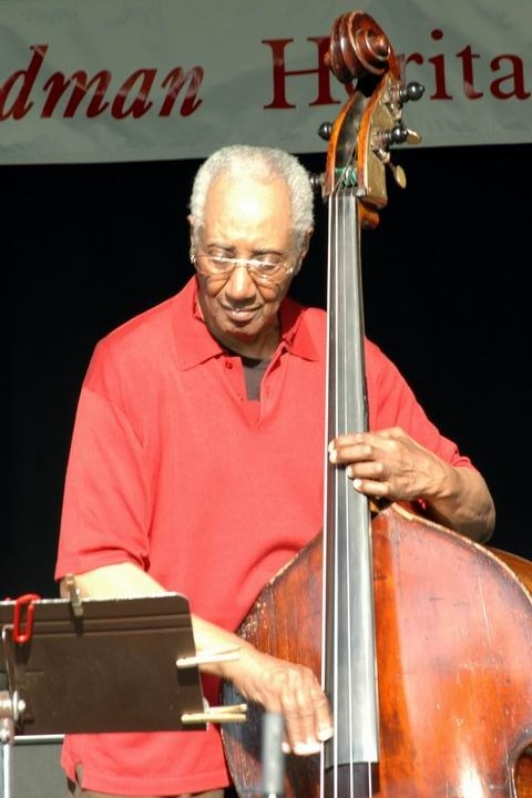 Jymie Merritt realizar en el año 2008 en los Premios de Patrimonio anuales Don Redman en Harpers Ferry, West Virginia